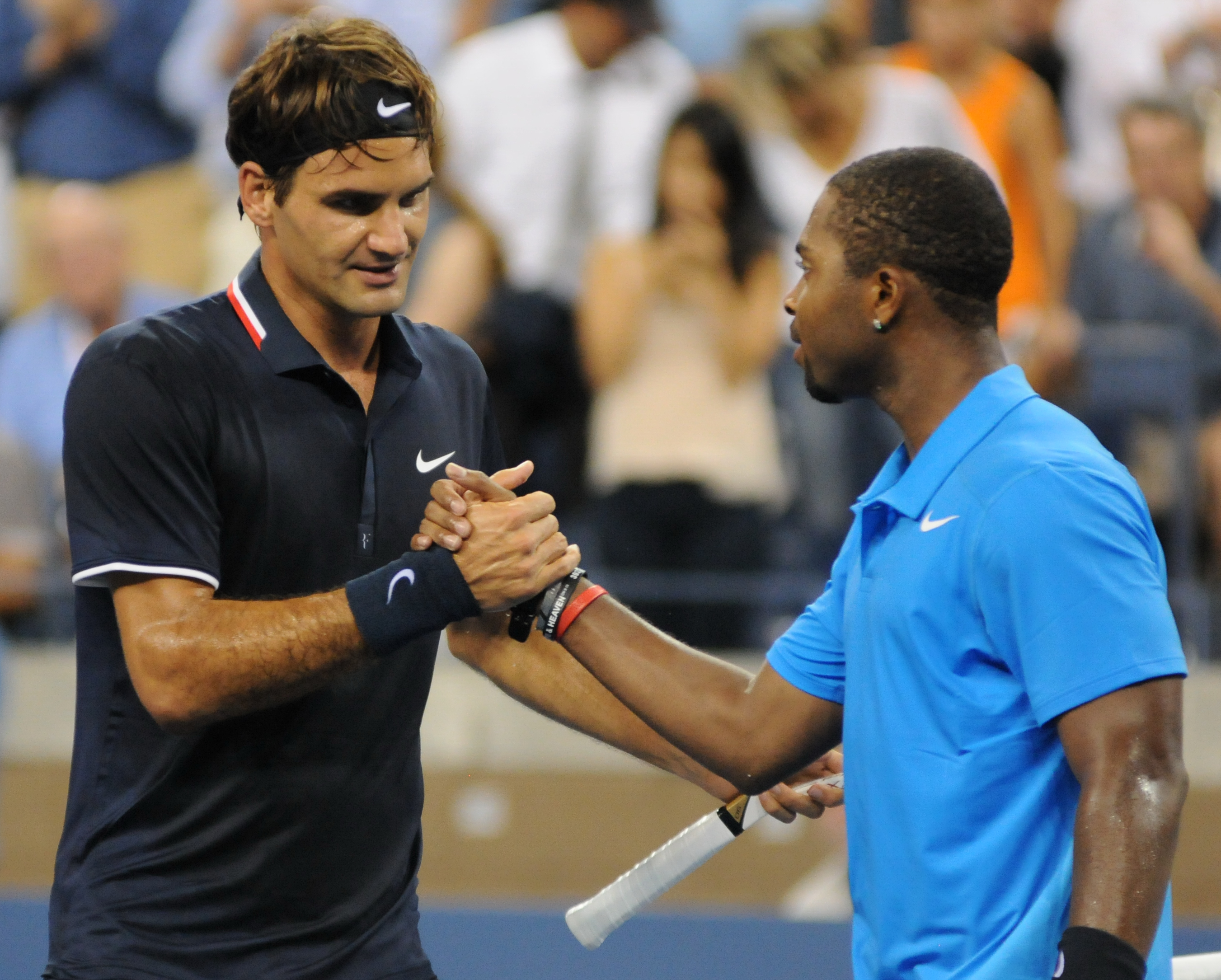 US Open 2012 US Open 2012